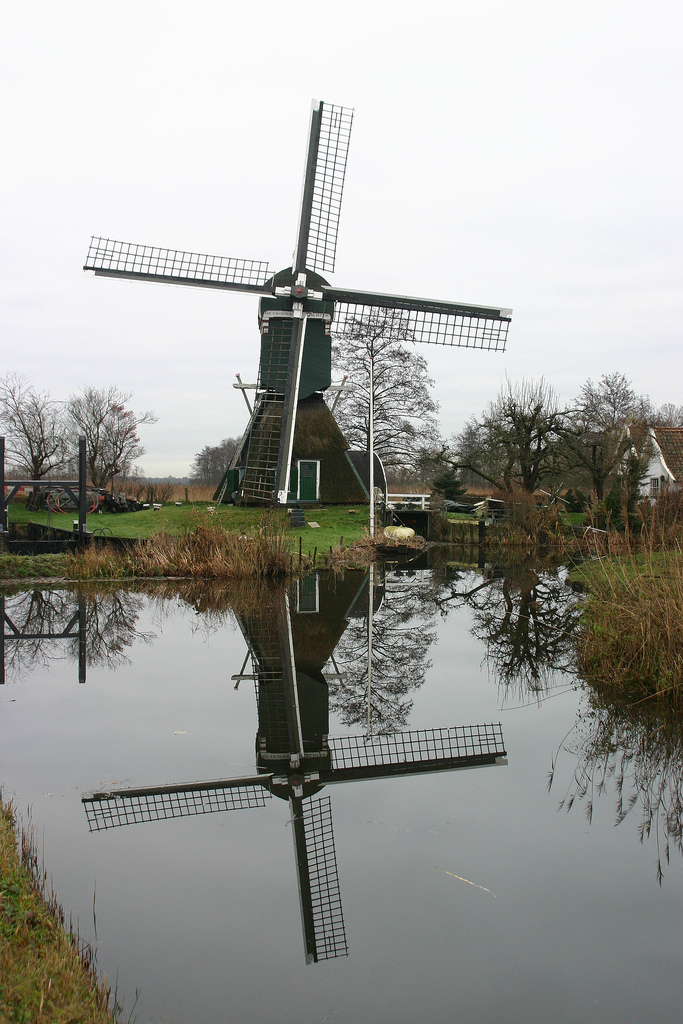 Molen De Trouwe Waghter, Tienhoven